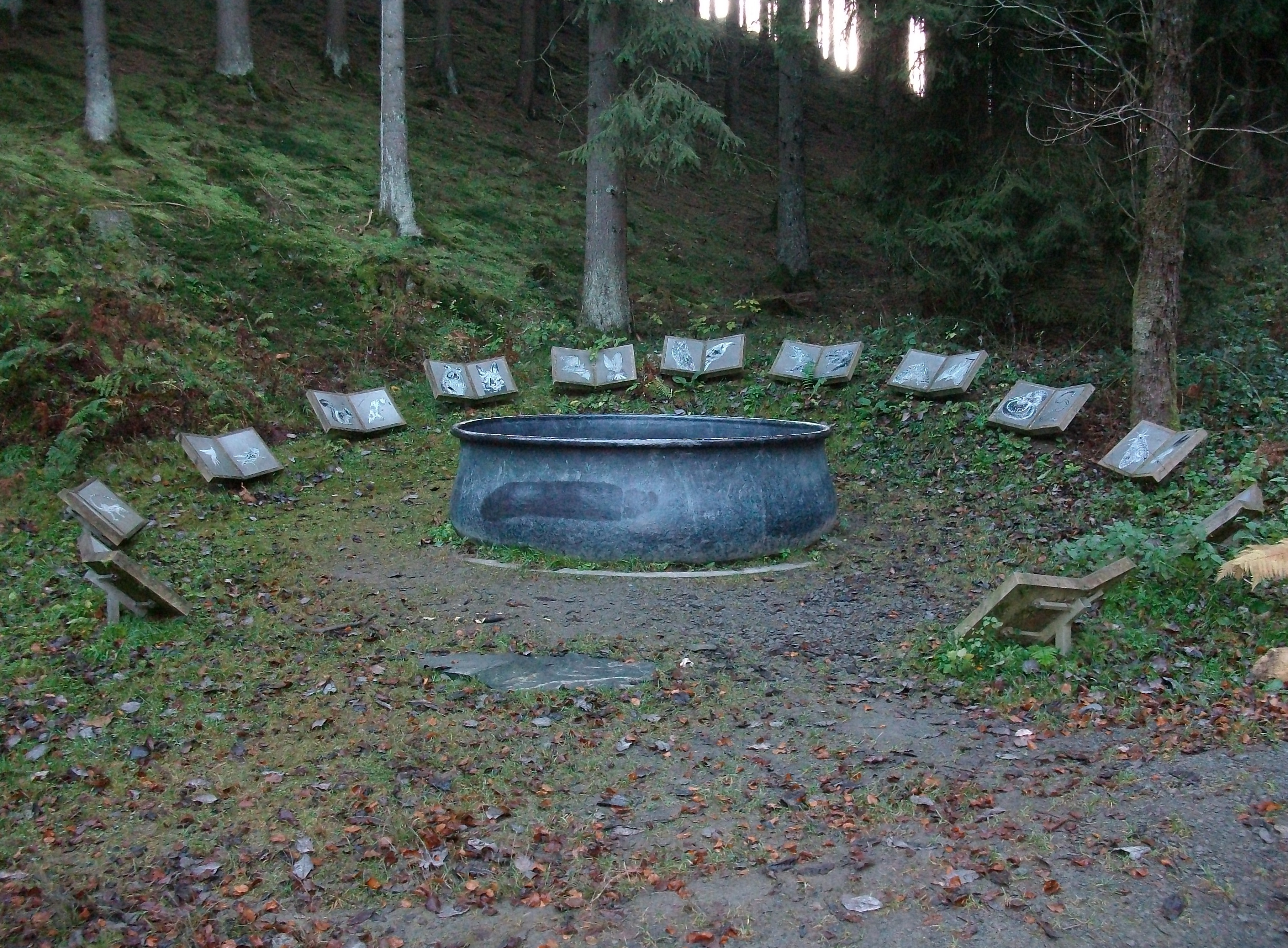 Der Hexenplatz (von Lilli Fischer), Waldskulpturenweg Wittgenstein−Sauerland, Schmallenberg-Oberkirchen, Germany.